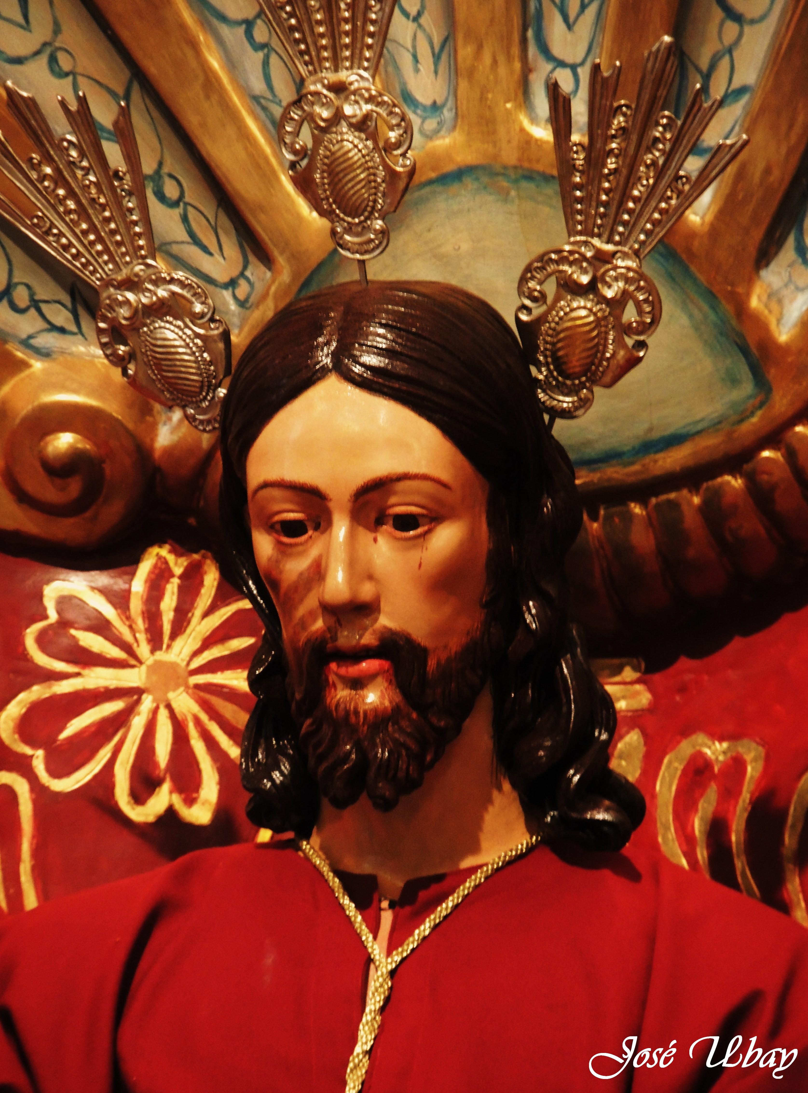 Santísimo Cristo de la Humildad y Paciencia. (siglo XVI). Parroquia de san Francisco de Asís - Las Palmas de Gran Canaria.